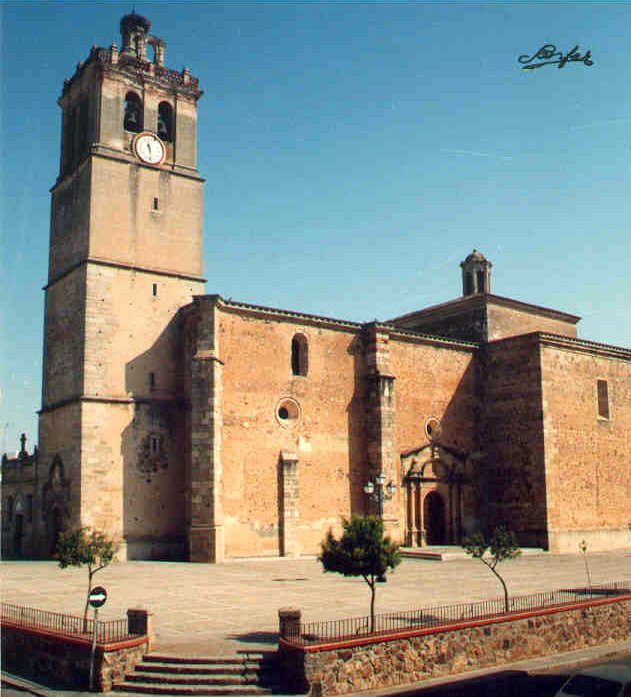 Parroquia de San Pedro, Montijo (Foto Sanfer)